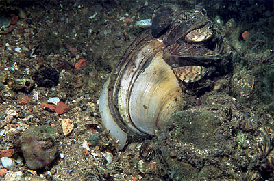 Zwanemossel Anodonta cygnea with cluster of Zebra mussels attached to its shell.